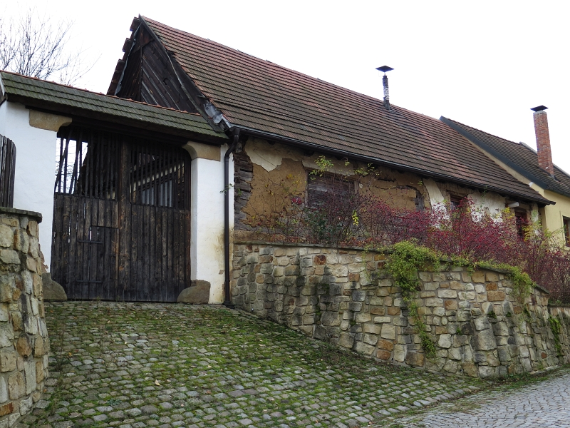 Usedlost Bolevec čp. 7, Plzeň 1-Bolevec, Bolevecká náves 7/9, Hynaisova 7/3, Plzeň.